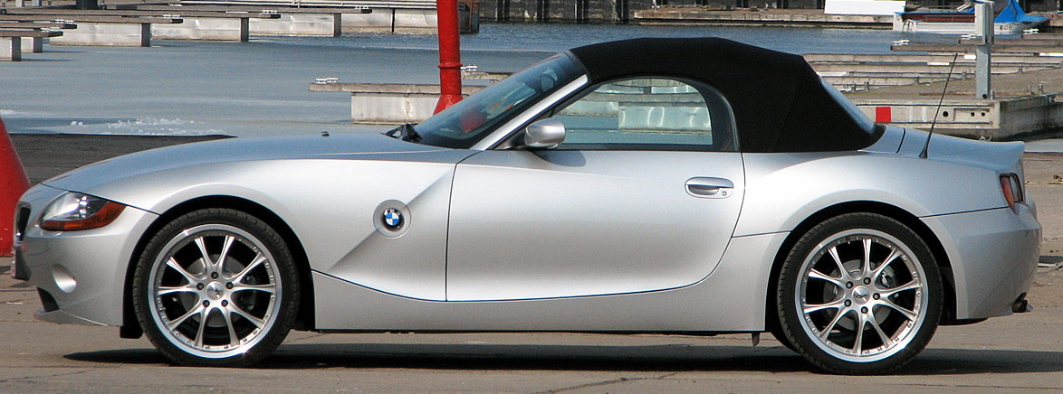 Beschreibung: BMW Z4 silver Fotograf: Darkone, 24. März 2006